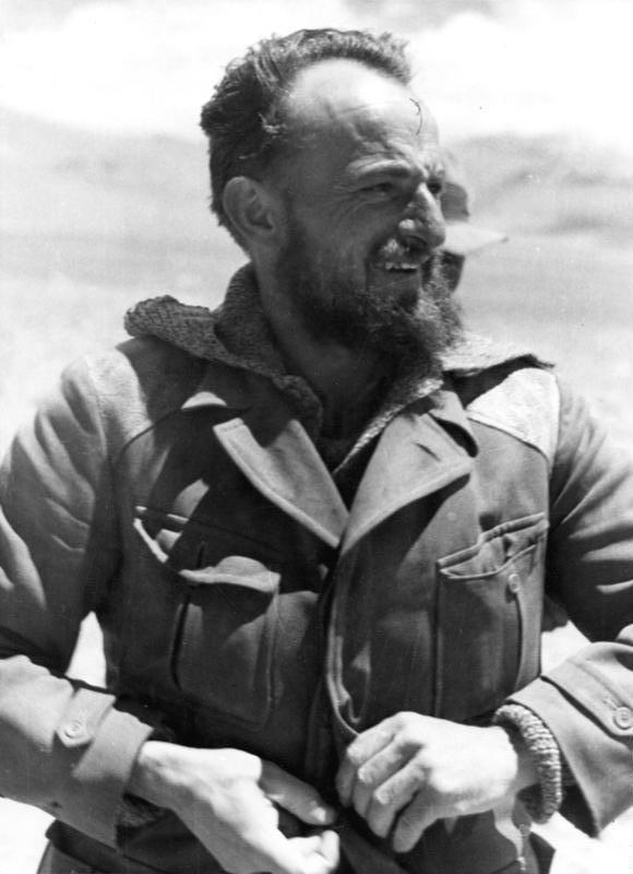 Krause